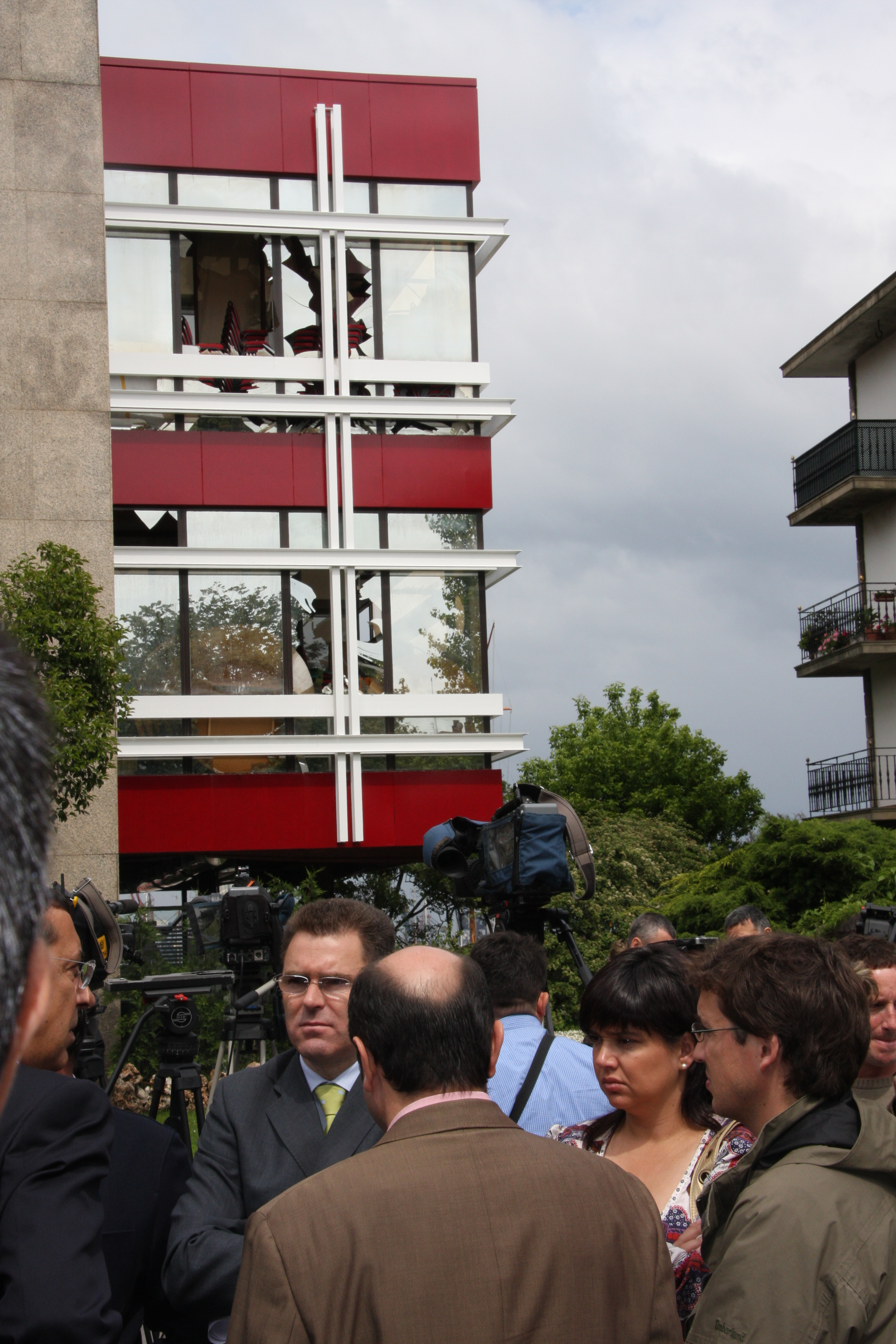 2008ko maiatzaren 19an, goizeko 0:50ak aldera, eztanda egin zuen lehergailuak zituen furgoneta bat Areetan dagoen Abrako Erret Itsas Klubean. Ordu bat lehenago Bizkaiko DYAra deitu zuen gizonezko batek ETAren izenean bonbaren abisua emateko. Eztandaren ondorioz, kalte handiak jazo ziren eraikinean eta itsas pasealekuan. Era berean, hainbat etxebizitza eta dendaren beirak puskatu ziren.